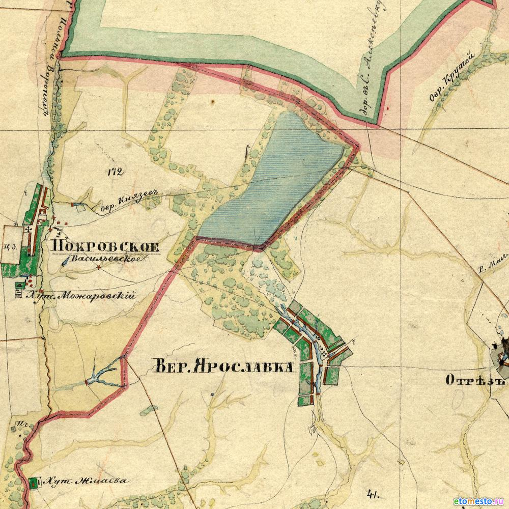 Карта Верхней Ярославки, 1862 год